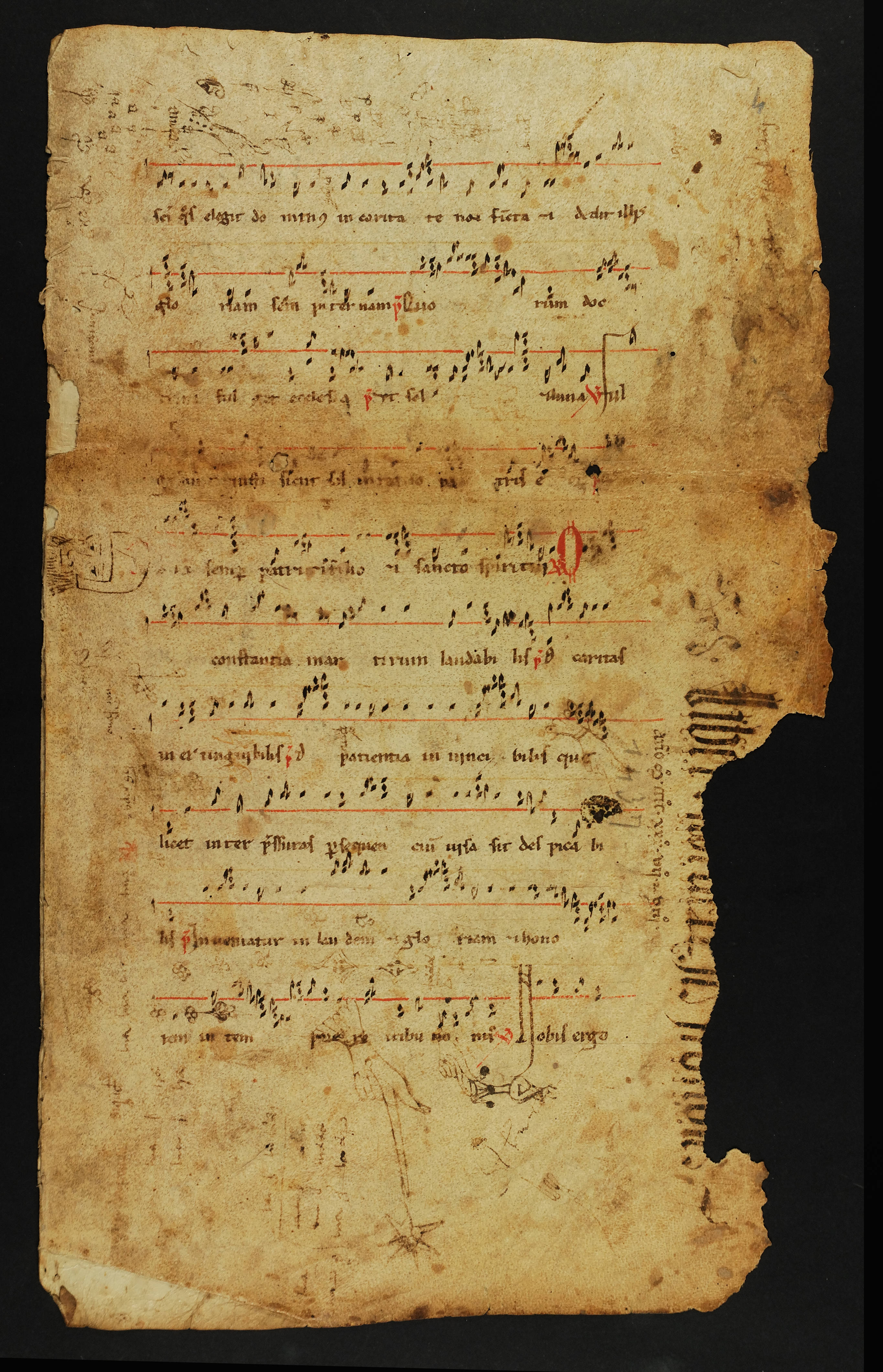 antifonari del segle XII